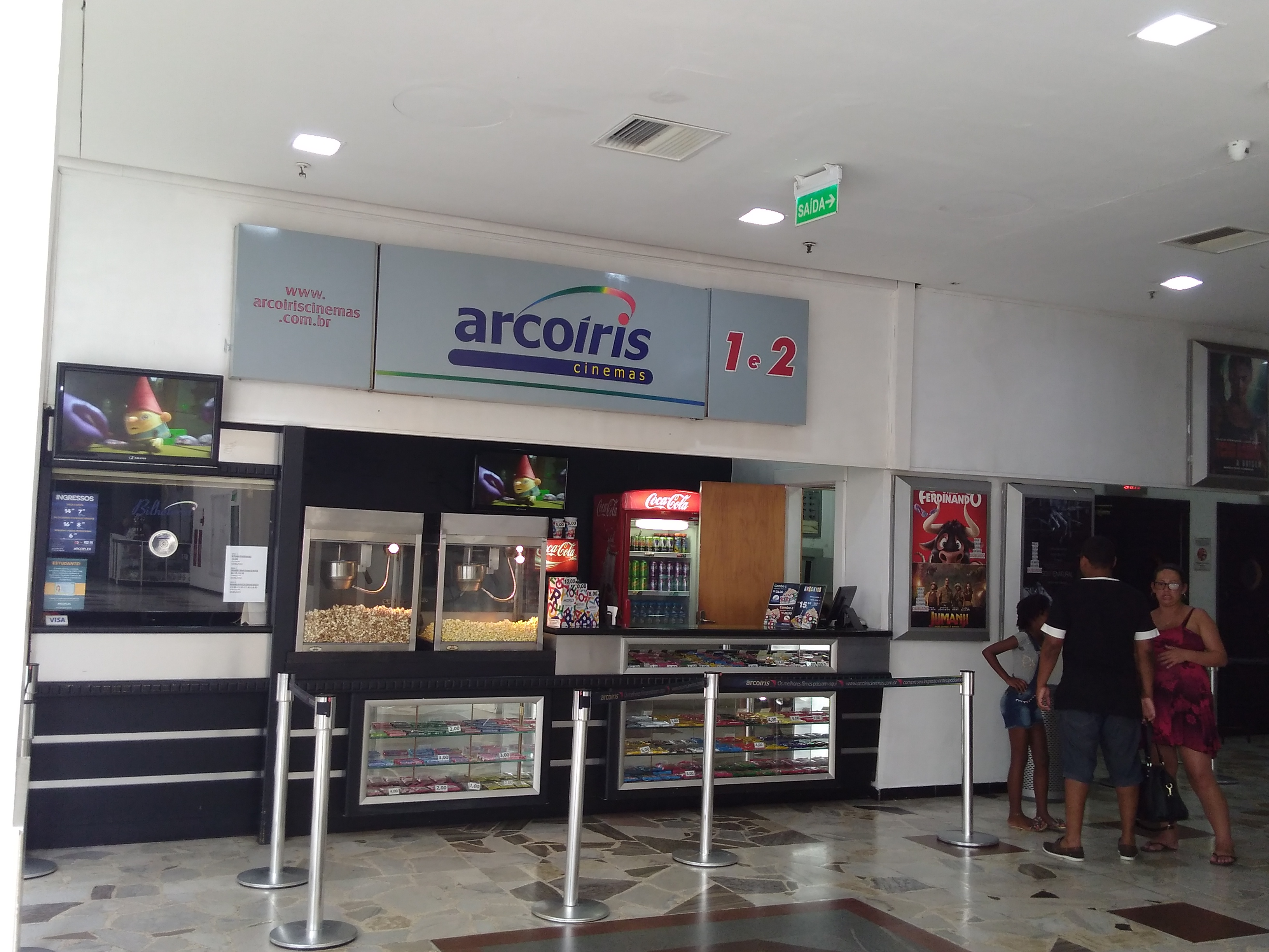 Vista frontal do Arcoplex Rua da Praia Shopping